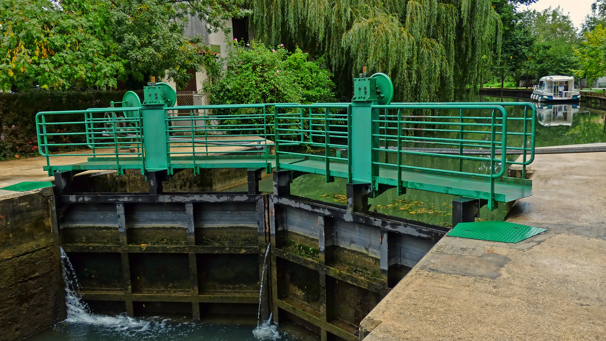 Vue de l'Ecluse à Jarnac (Charente, France)